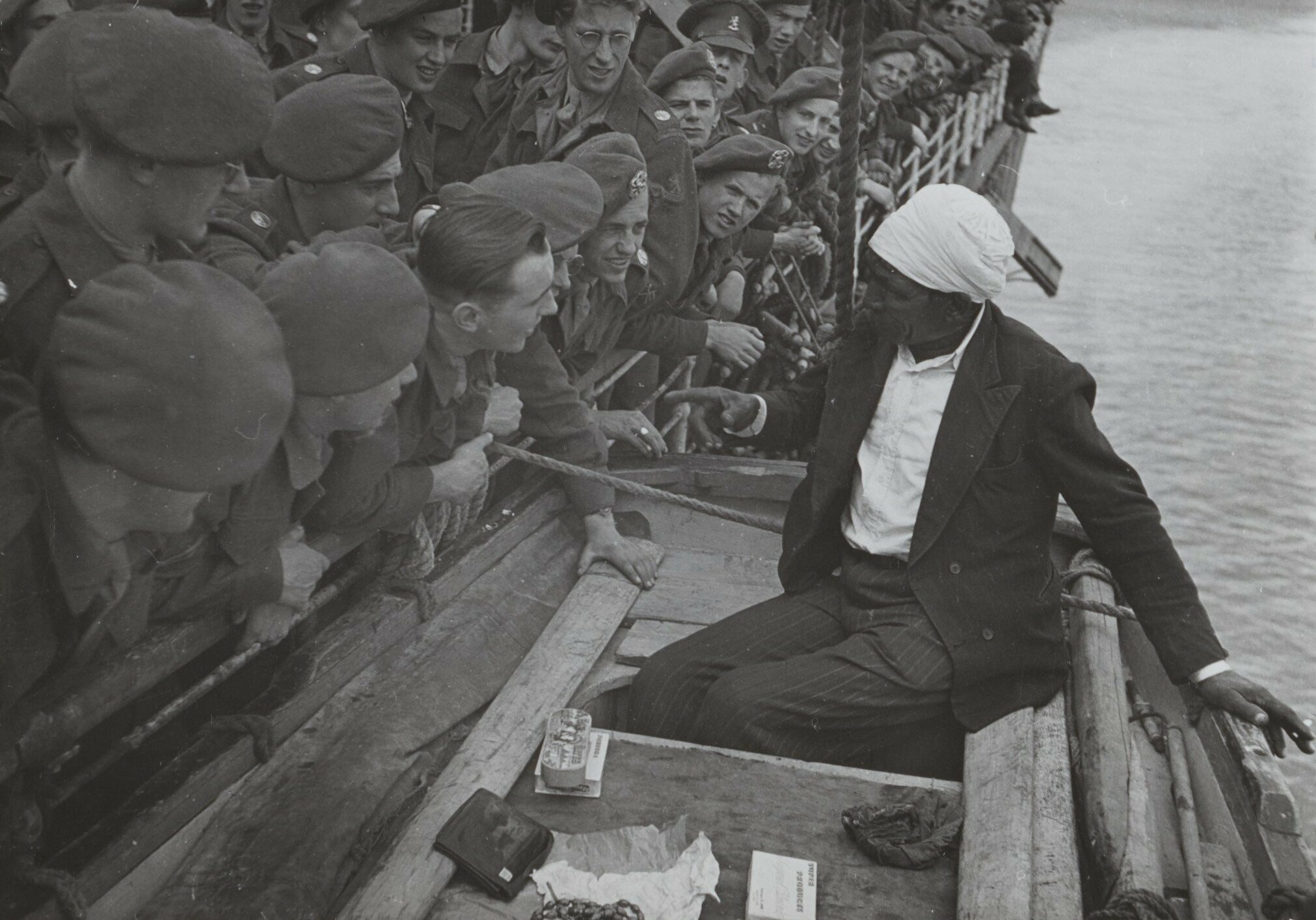 Collectie / Archief : Fotocollectie Spaarnestad Onderwerpen Reportage / Serie : Staatsvorming Indonesië: Landoorlog. Mi. Beschrijving : De "Volendam", het troepentransportschip, waarmee ook een aantal journalisten de reis naar Indonesië mede maakt, vaart door het Suezkanaal. De Arabieren laten geen gelegenheid voorbij gaan om de jongens aan boord hun handelswaar te verkopen. Over de prijs wordt nog onderhandeld Annotatie : Zie Anefo 902-6290 [negatief ontbreekt daar] Datum : 15 maart 1948 Locatie : Indonesië Trefwoorden : bestuur, grenzen, grondwetten, staatkunde, staatsvorming Fotograaf : Presser, Sem / Anefo Auteursrechthebbende : Nationaal Archief Materiaalsoort : Foto (zwart/wit) Nummer archiefinventaris : bekijk toegang 7.000SPAond Inventarisnummer : 344025 Bestanddeelnummer : 344025_035